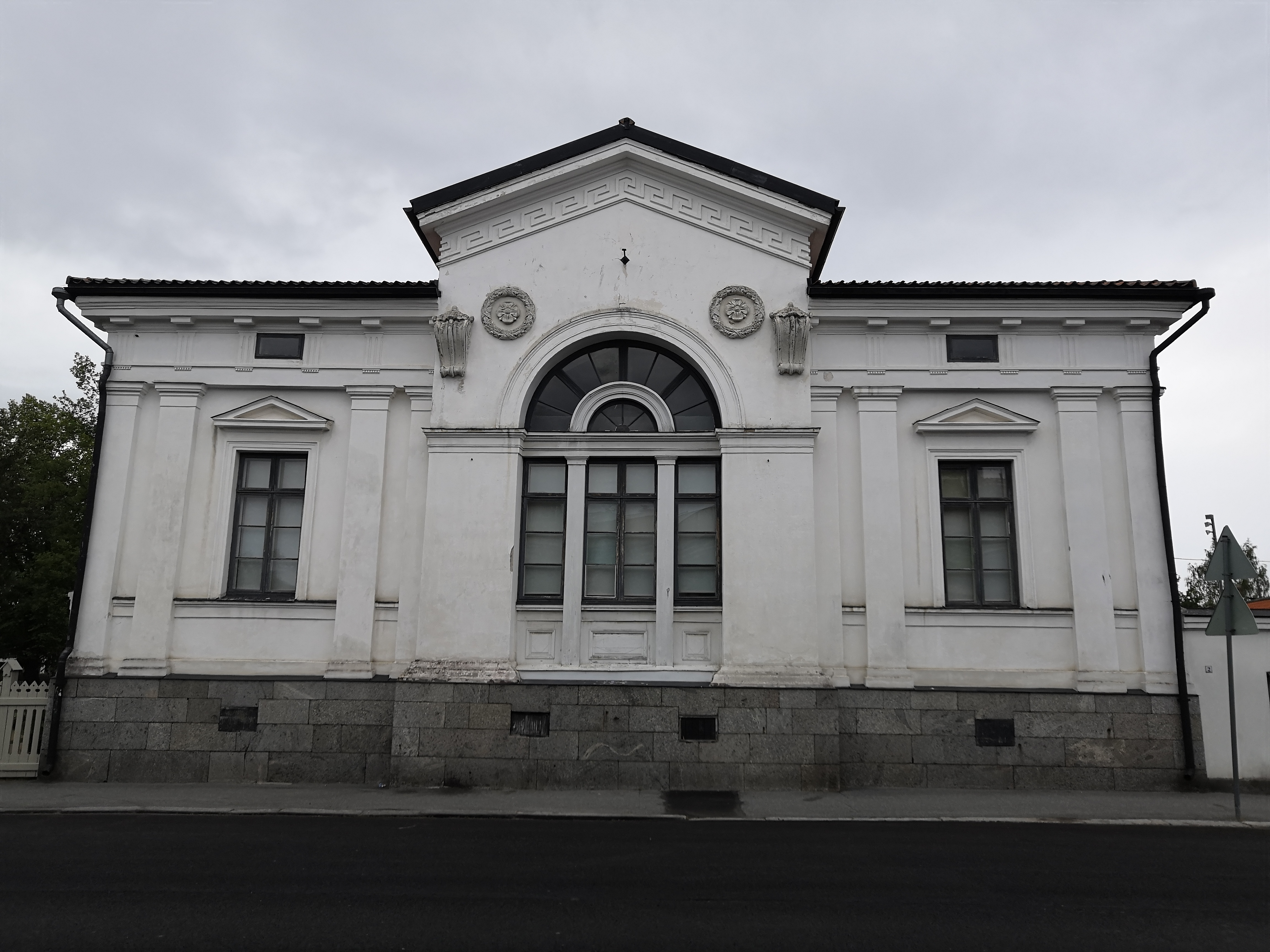 Malmin talo on Peter Malm jr:n 1835-1838 rakennuttama rakennus Pietarsaaressa. Rakennuksen suunnitteli Anders Fredrik Granstedt syksyllä 1835.